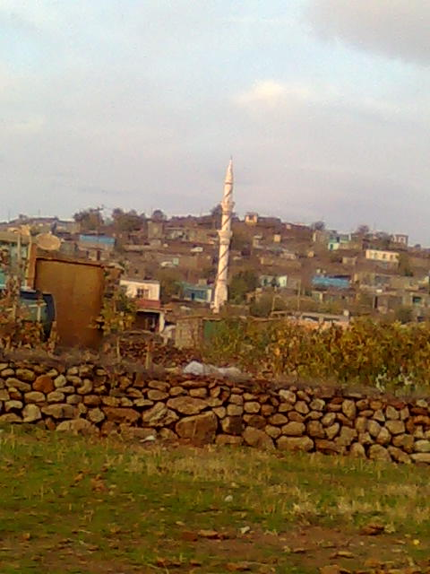 63600 Sarıkaya/Siverek/Şanlıurfa, Turkey